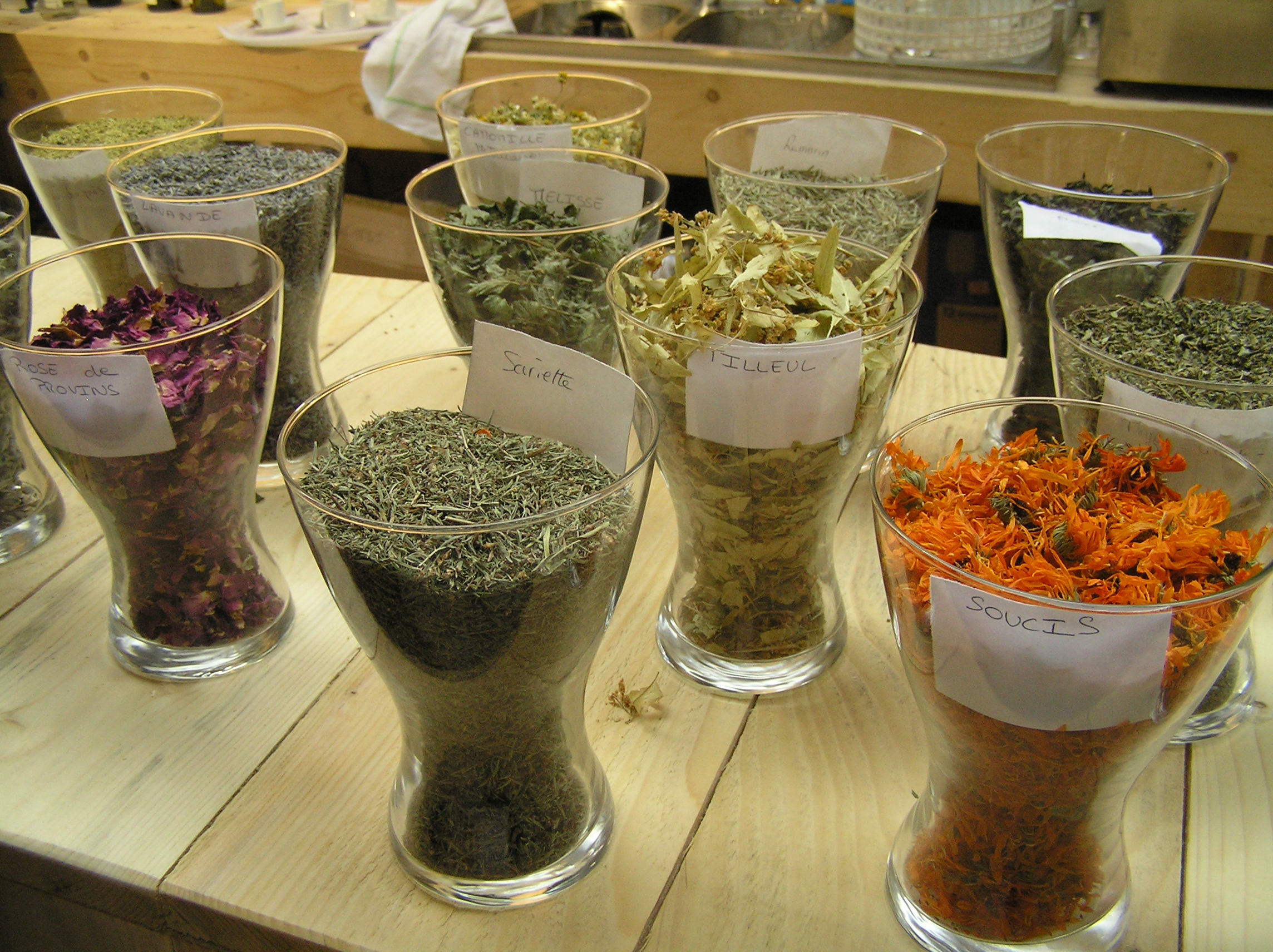 Herbal Tea